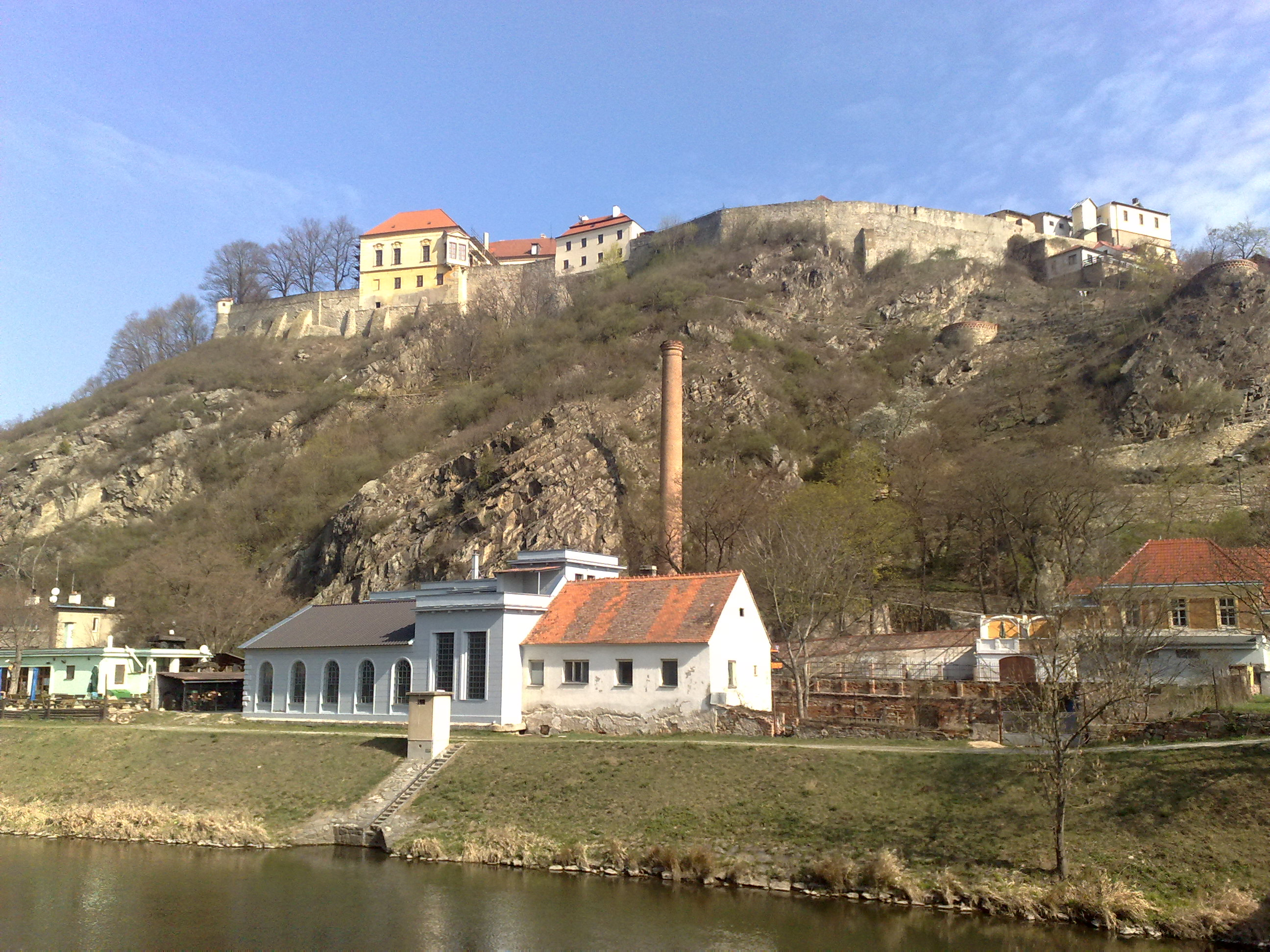 Fotografie pořízená ve Znojmě.